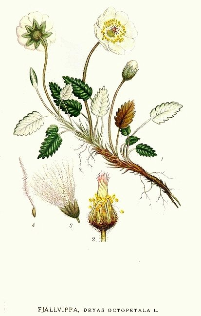 Dryas octopetala L. Original Description Fjällvippa, Dryas octopetala L.